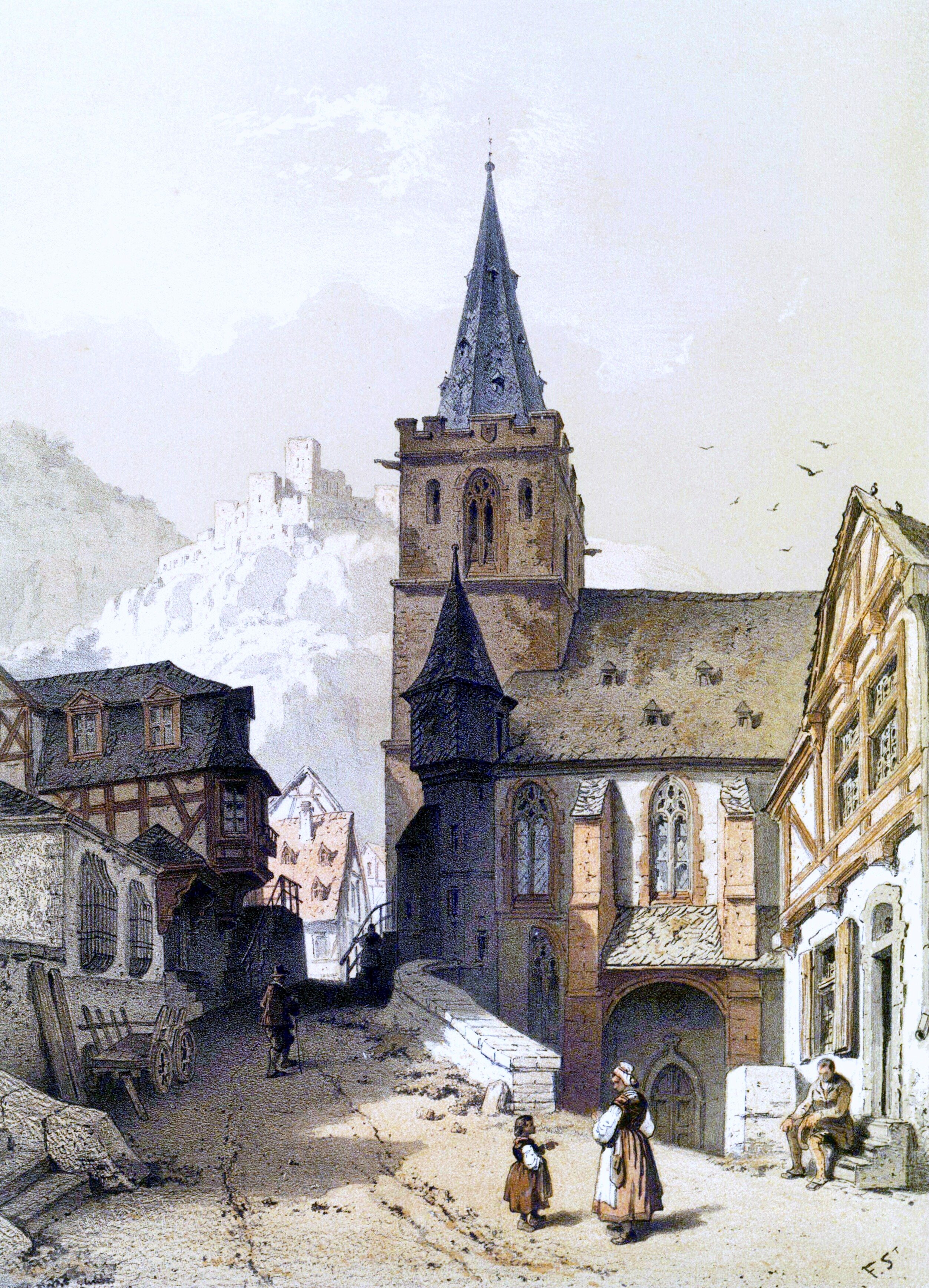 Aquarell der Evangelischen Stiftskirche St. Goar, im Hintergrund Burg Rheinfels von Théodore Fourmois